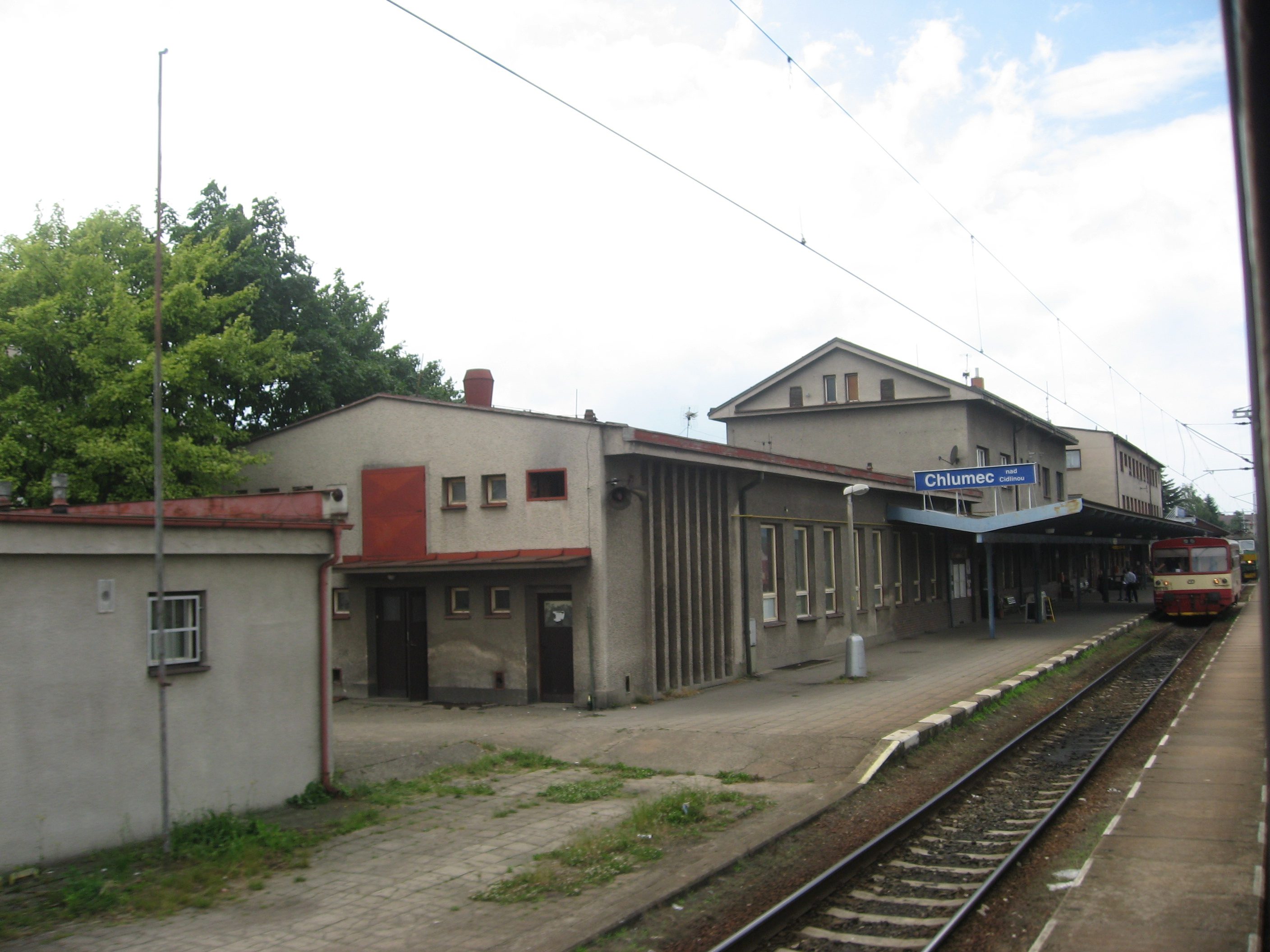 Chlumec nad Cidlinou, nádraží